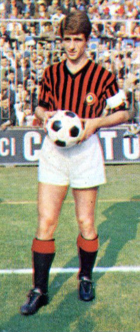 Il calciatore italiano Gianni Rivera, capitano del Milan nella stagione 1967-68, in posa all'interno dello stadio San Siro di Milano.